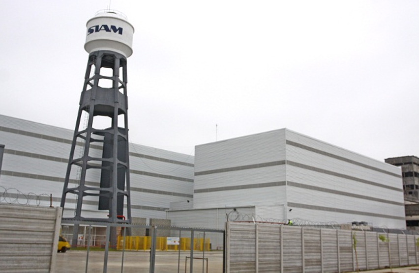 SIAM abril 2014